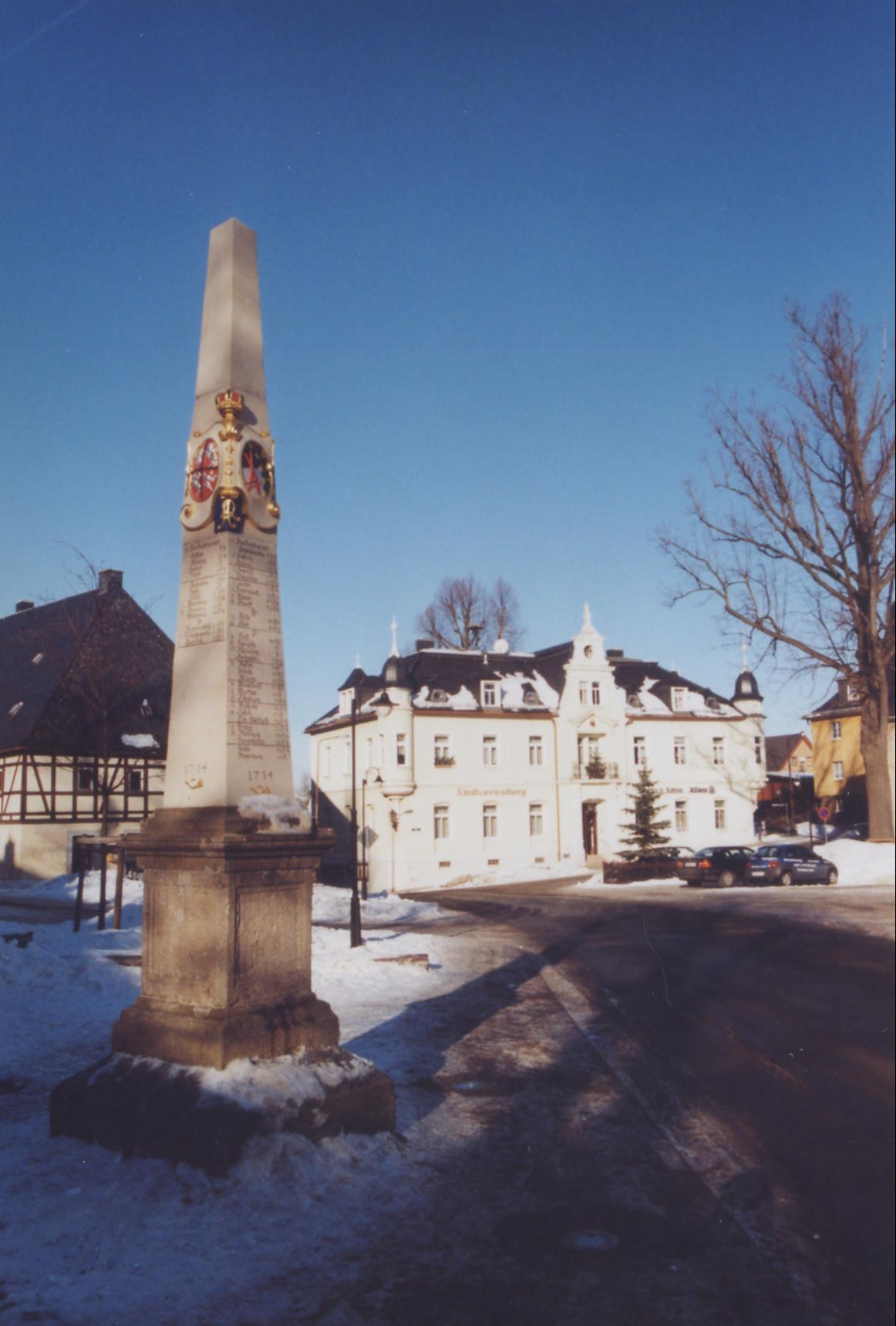 Bärenstein (Osterzgebirge): Postmeilensäule am Markt